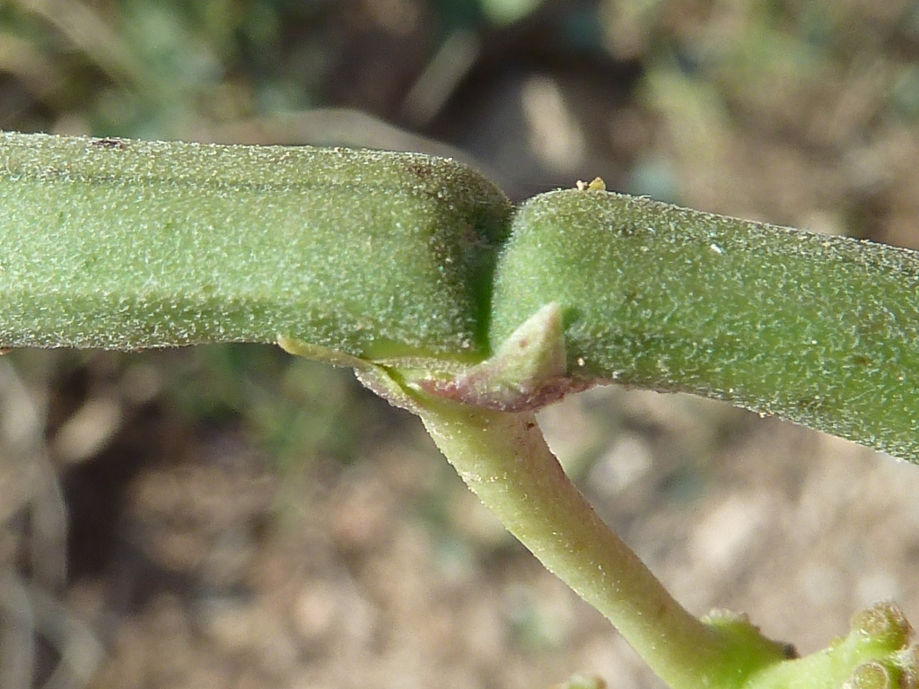 Cynanchum acutum (Matacán): Frutos desdoblados divergentes inmaduros, detalle - La Huerta/Camino de la Azarbe de Patricio - Albatera (Alicante, España).